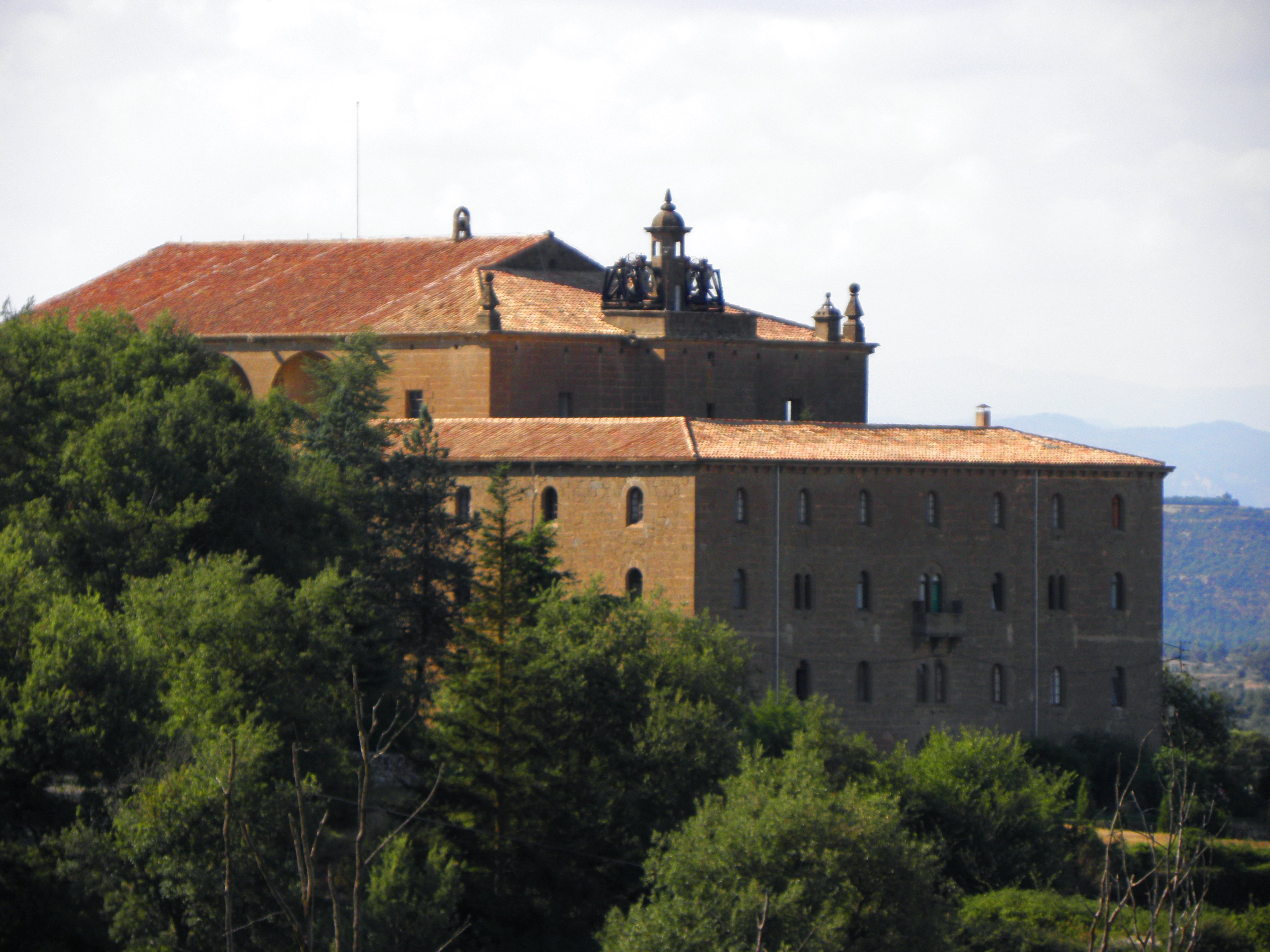 El monestir del Miracle (Riner, Solsonès) vist des de la banda de llevant amb les noves campanes.